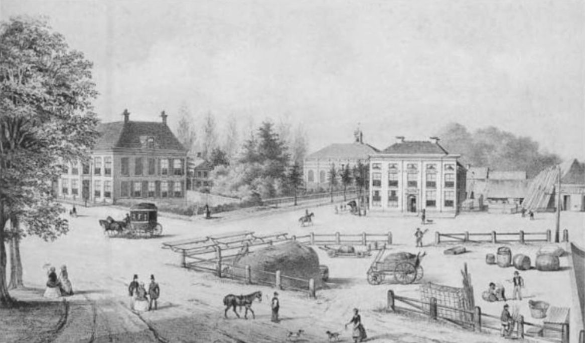 De Markt in Assen. Aan de linkerkant het Hofstedehuis, rechts van het midden de Jozefkerk en aan de rechterkant 't Wapen van Drenthe.